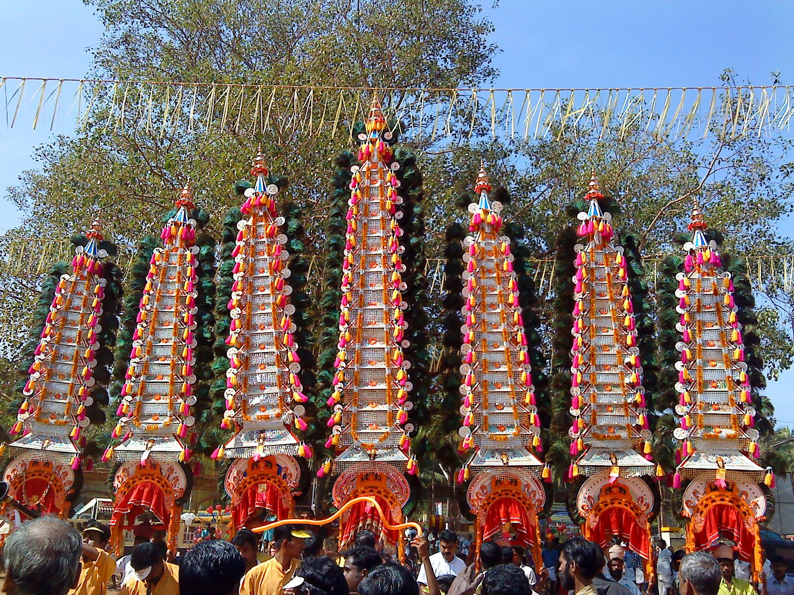 പീലിക്കാവടി എന്നും തൃശ്ശൂര് ഭാഗത്ത് പറയും. ചീരക്കുഴി ഷഷ്ടി മഹോല്‍സവത്തിനിടെ എടുത്ത ചിത്രം.